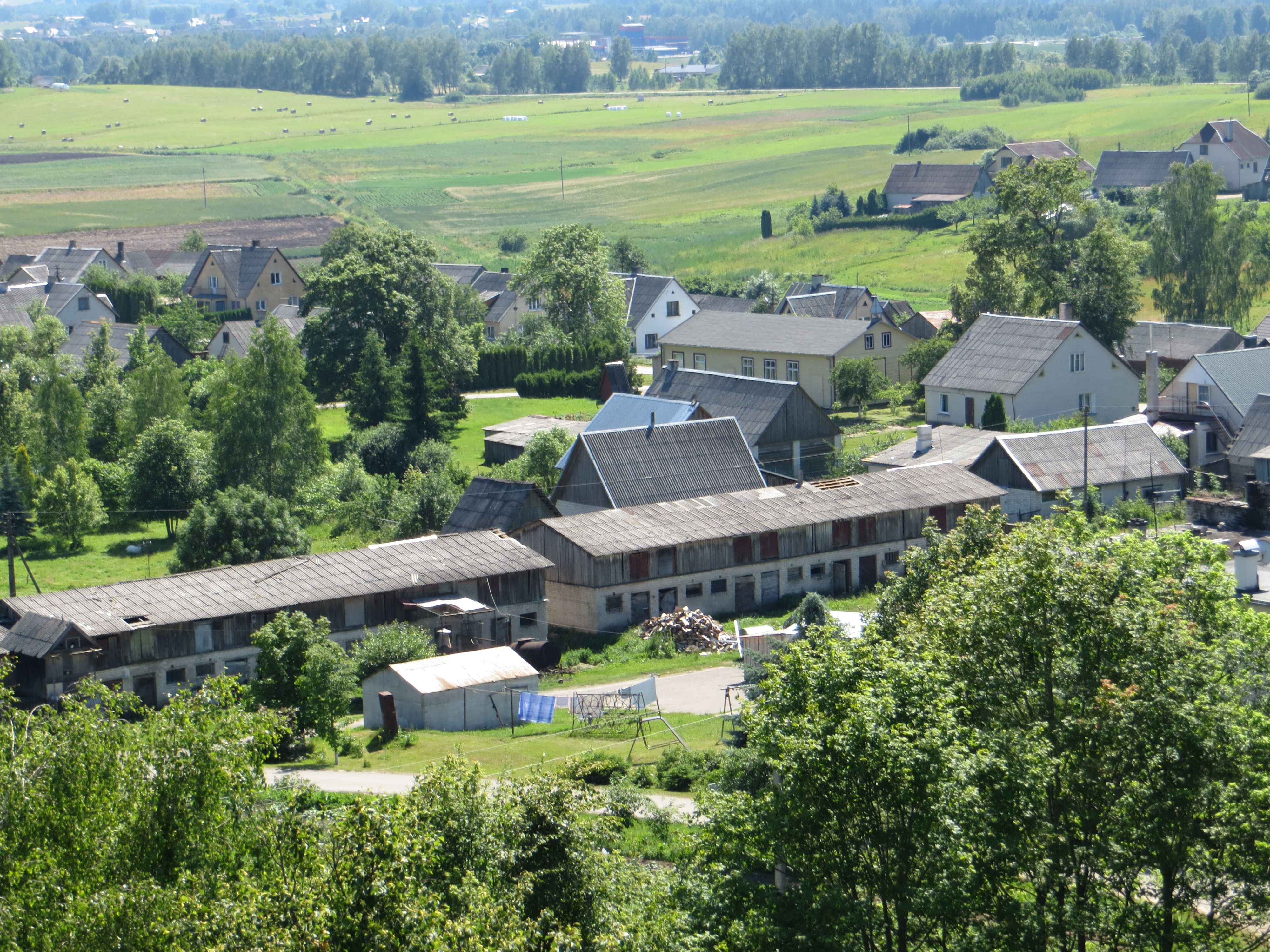 Venciūnai, Lithuania